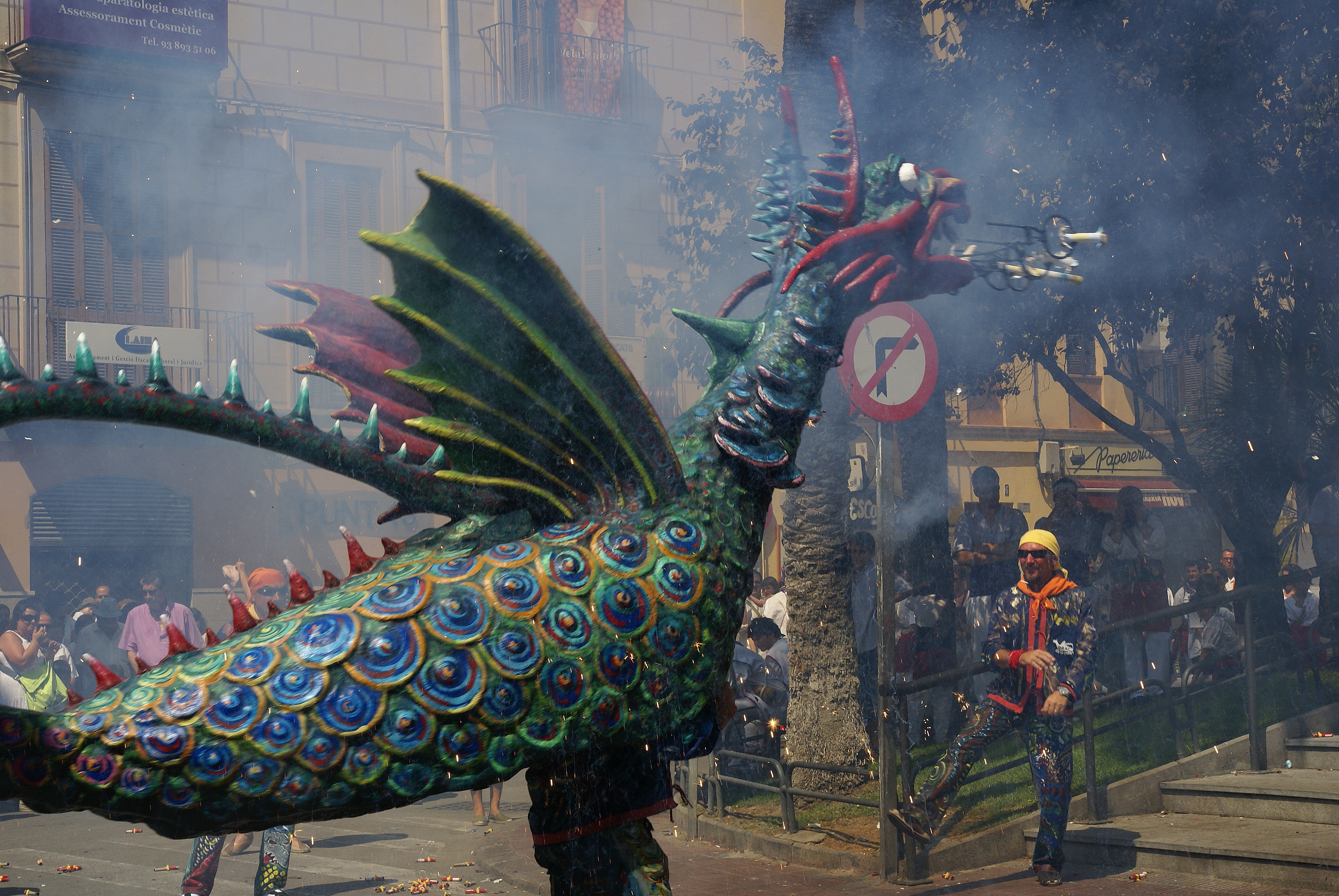 El Drac de la Geltrú